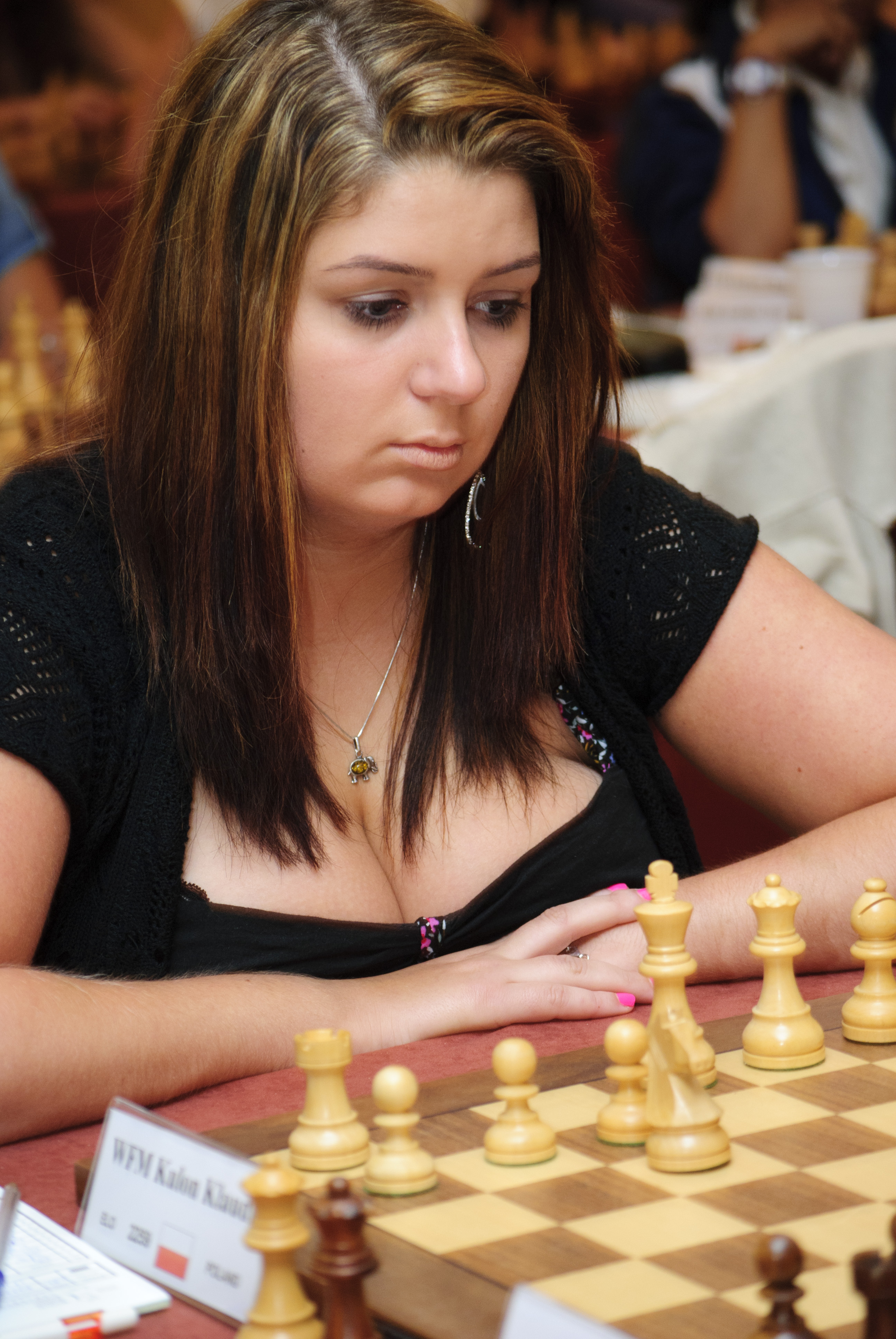 WFM Kulon Klaudia, WChJ Athens 2012